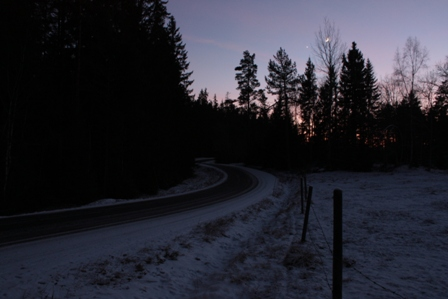 Länsväg T597 vid Anderstorp, 1km väster om Närkesberg